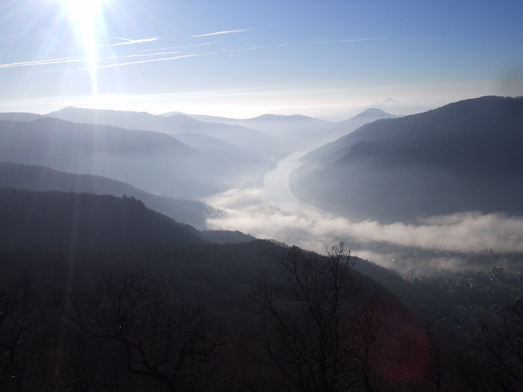 České středohoří Ceske Stredohori Labe